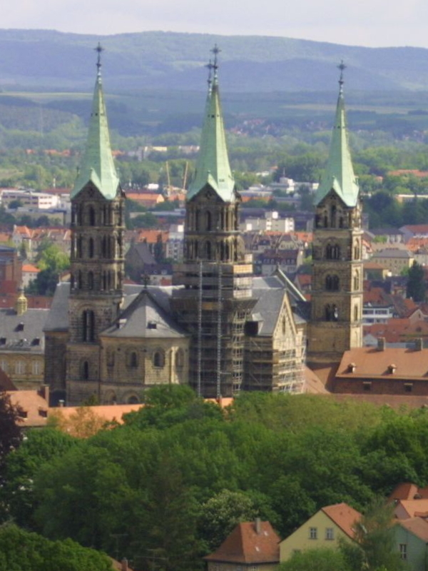 Bamberger Dom